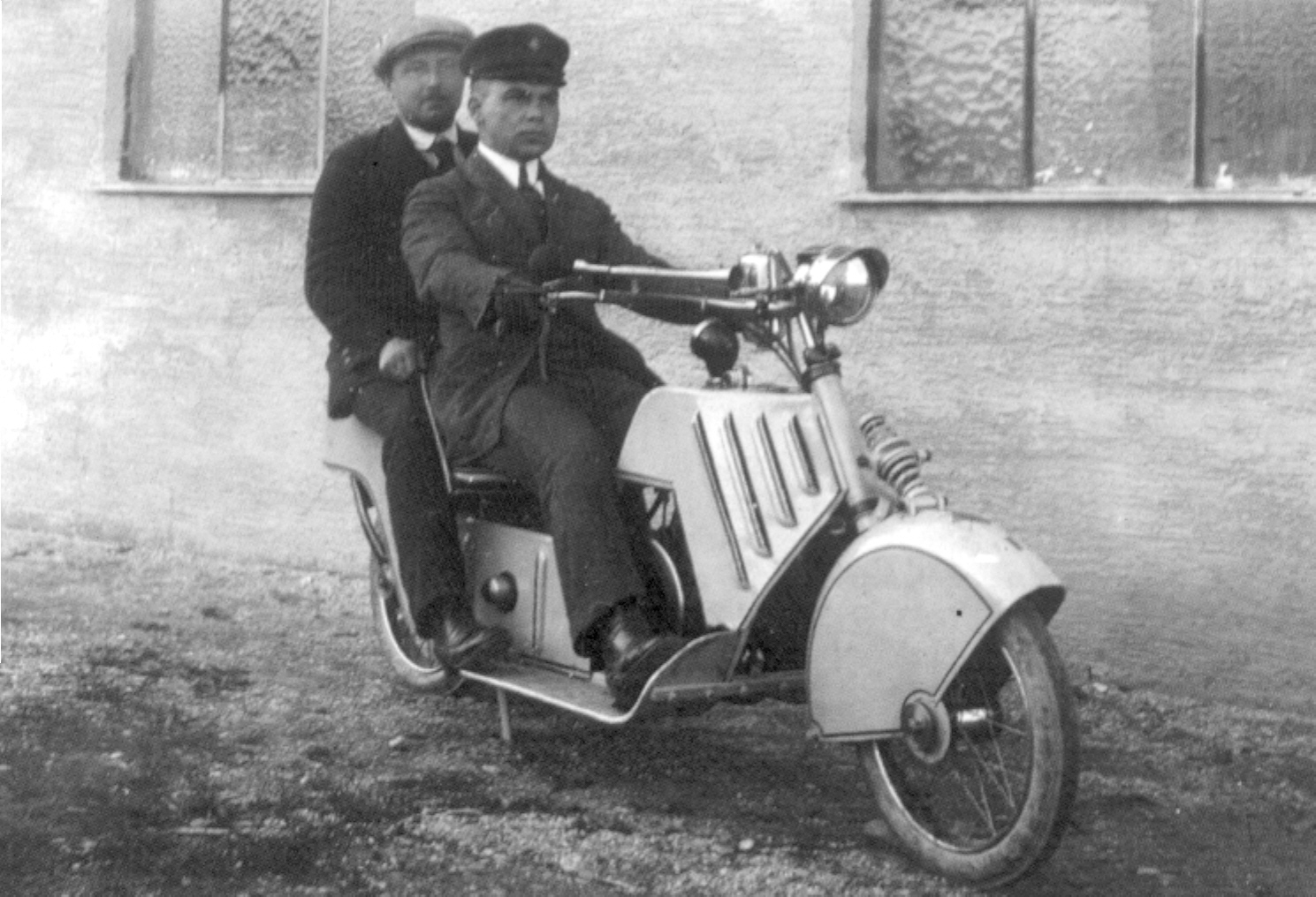 Pawa motorcycle 1922 (Germany)